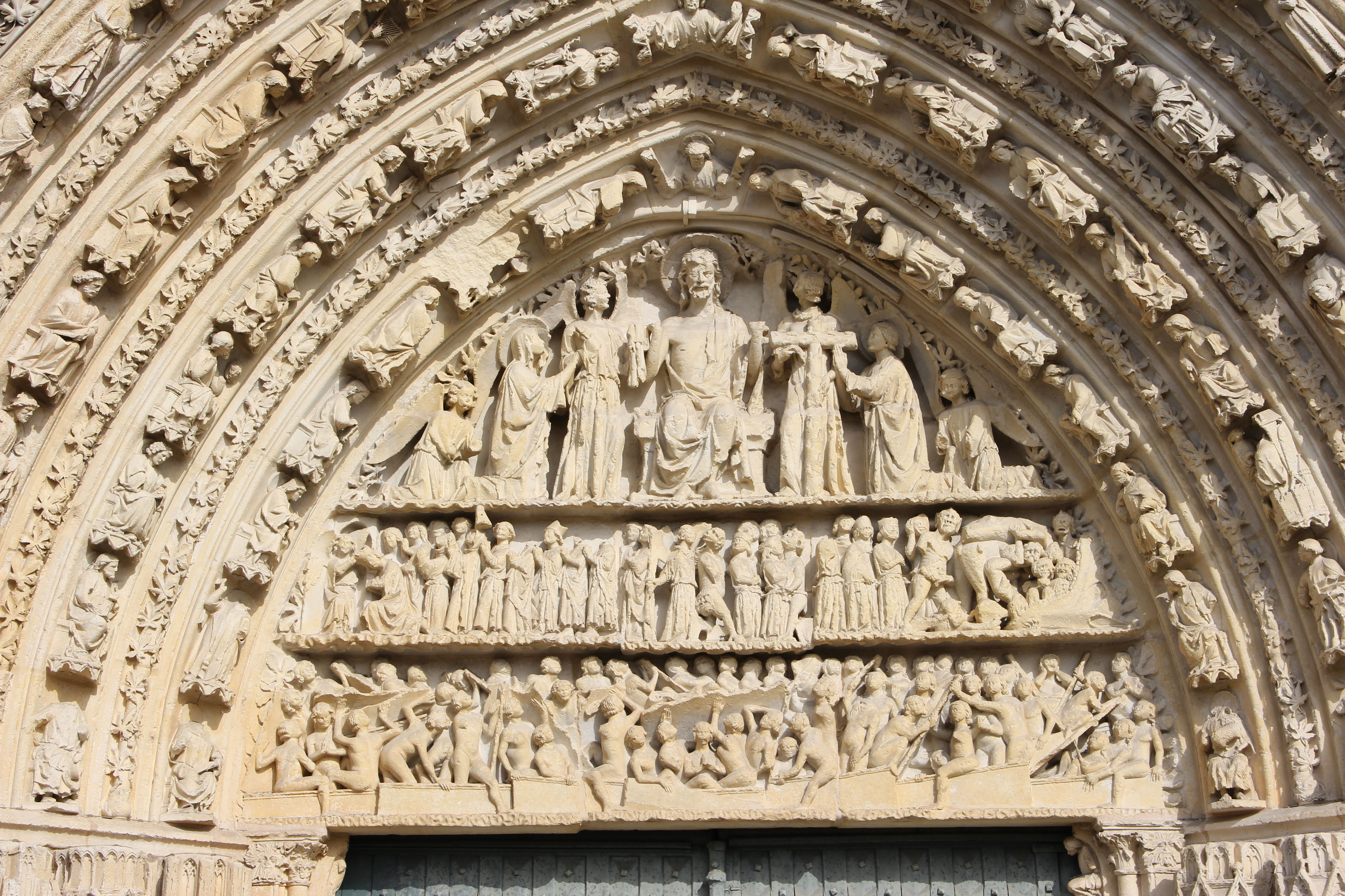 Portail de la cathédrale Saint-Pierre de Poitiers. XIIIe s.